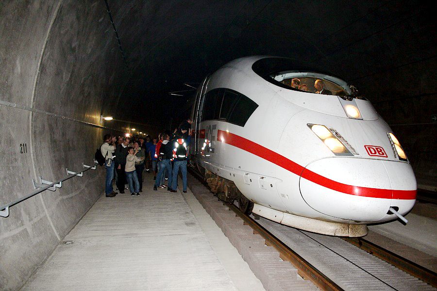 Tunnelrettungsübung im Euerwang-Tunnel am 06.05.2006